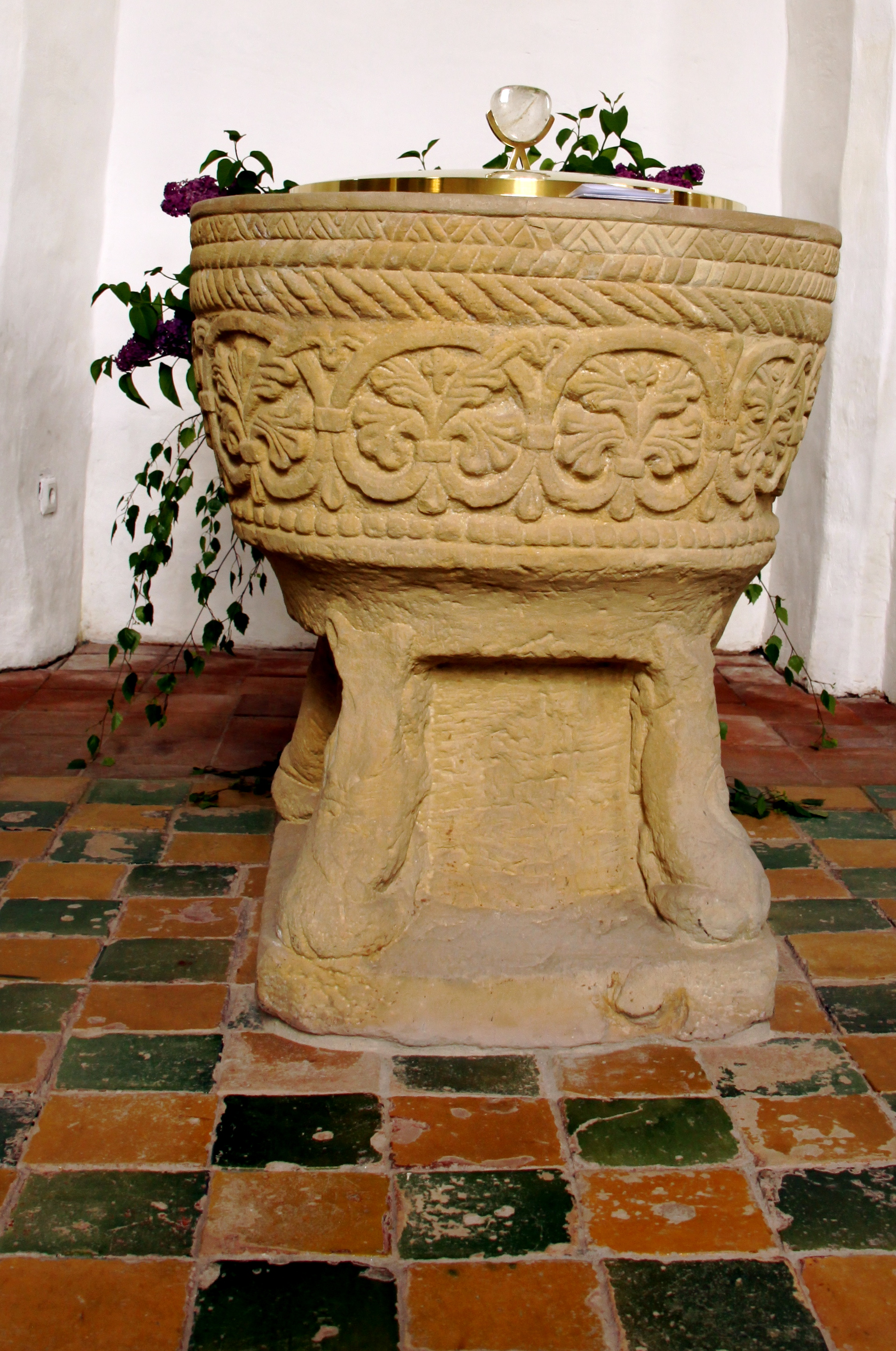 Taufstein der Loquarder Kirche